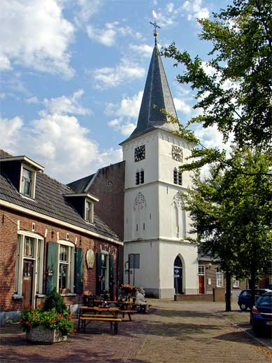 Kerk van Holten